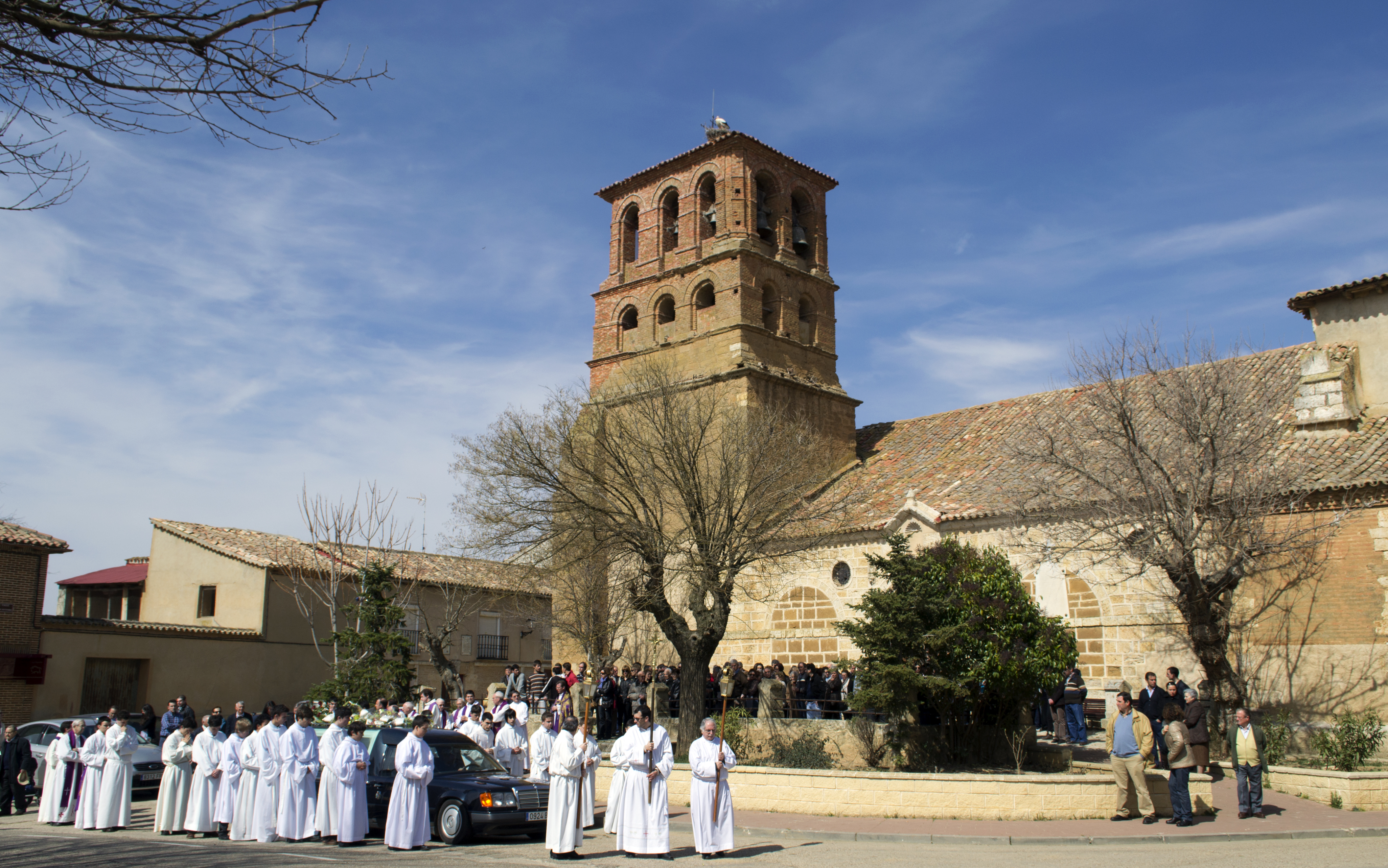 Fotografía: Ángel Cantero. Funeral del seminarista menor de la Diócesis de Valladolid, Alberto Rodríguez.